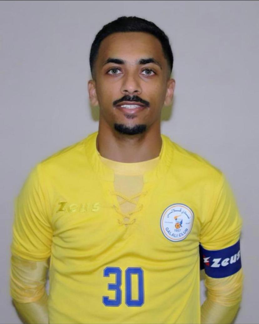 صوره الى ناصر محمد سعود لاعب قلالي والمنتخب البحريني سابقا